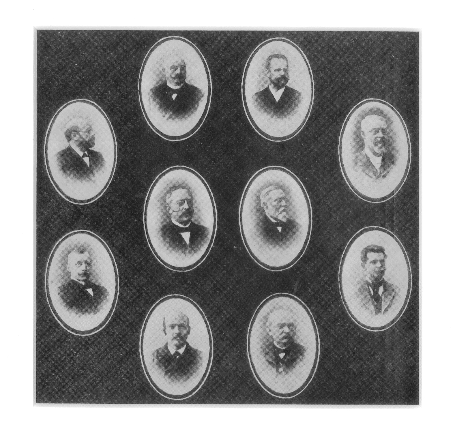 Otto Albert Blehrs første regjering (21. april 1902 - 22. oktober 1903).